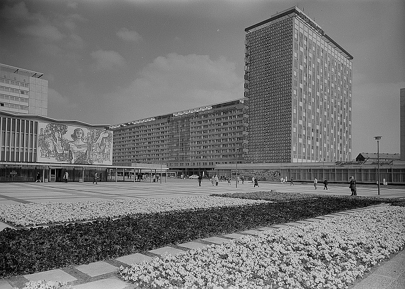 Original image description from the Deutsche Fotothek Dresden. Leninplatz mit Restaurant Bastei, Hotel Newa und Appartementhaus Prager Straße